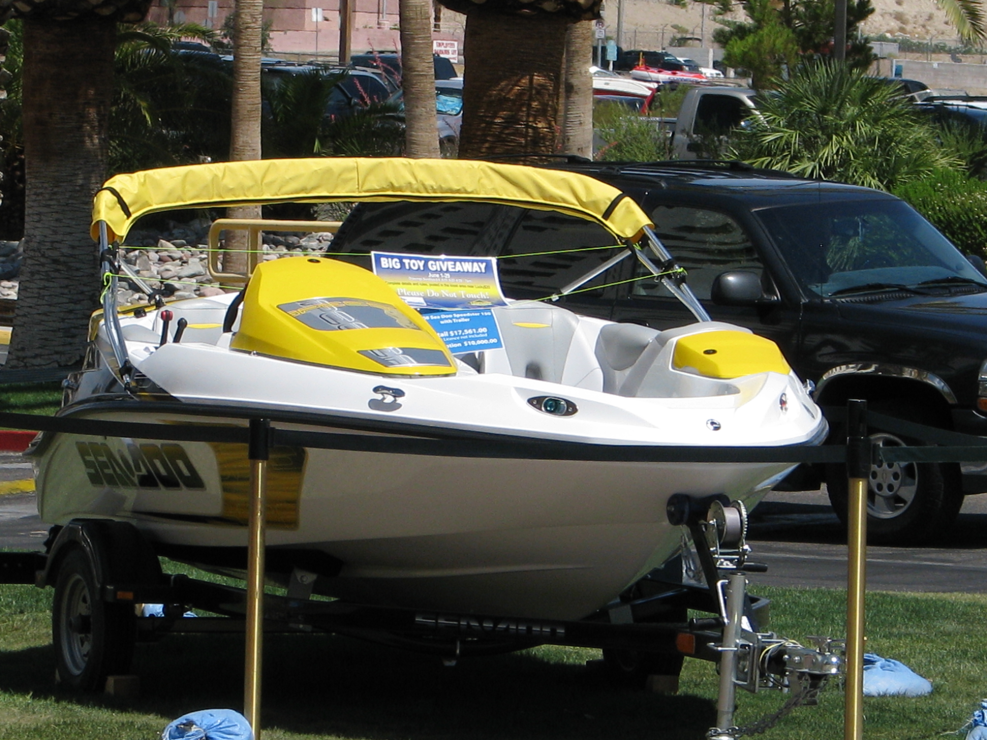 Sea Doo Boat